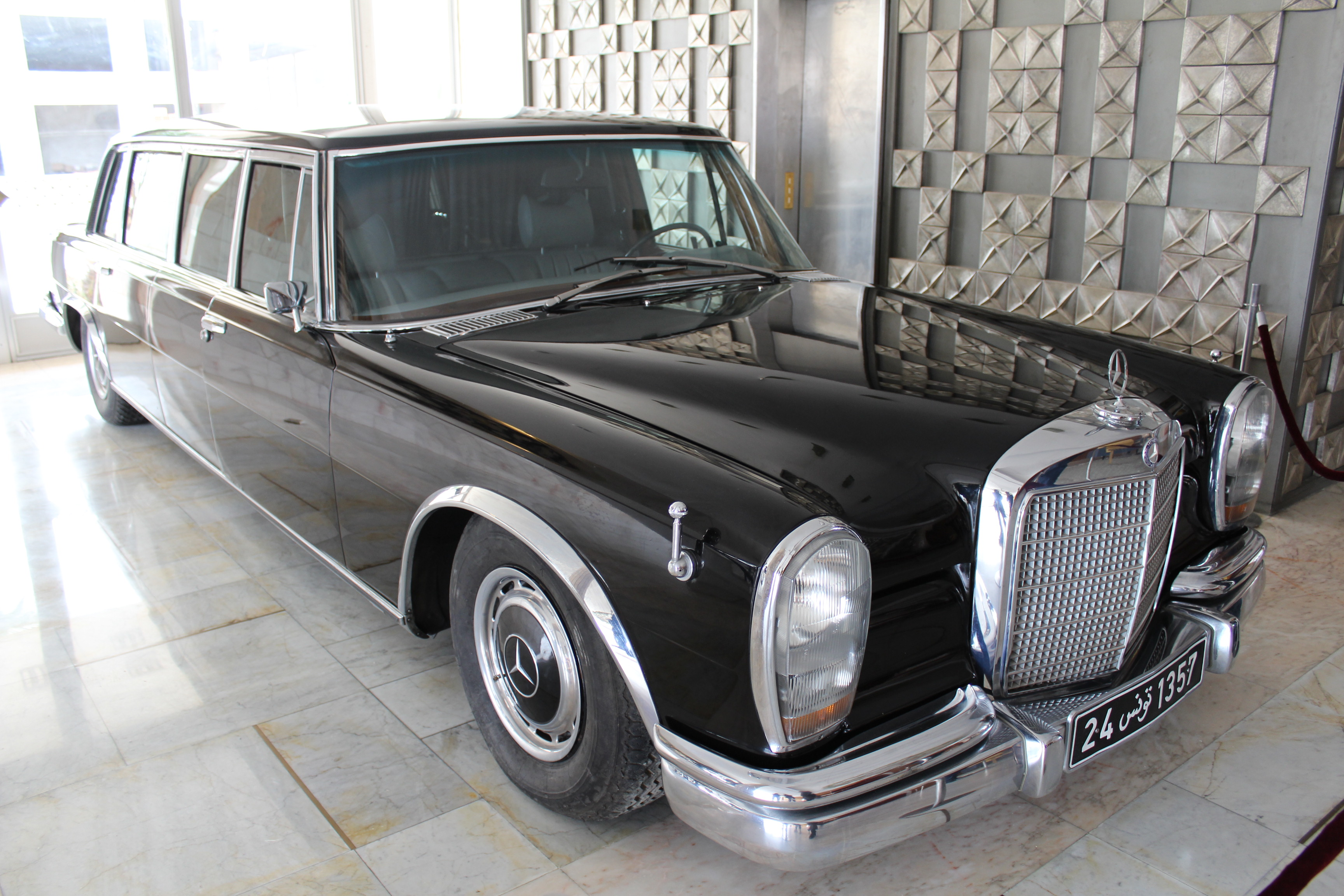 Musée Habib Bourguiba à Skanès